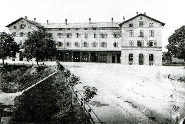 Bahnhofsgebäude nach dem Umbau 1860.